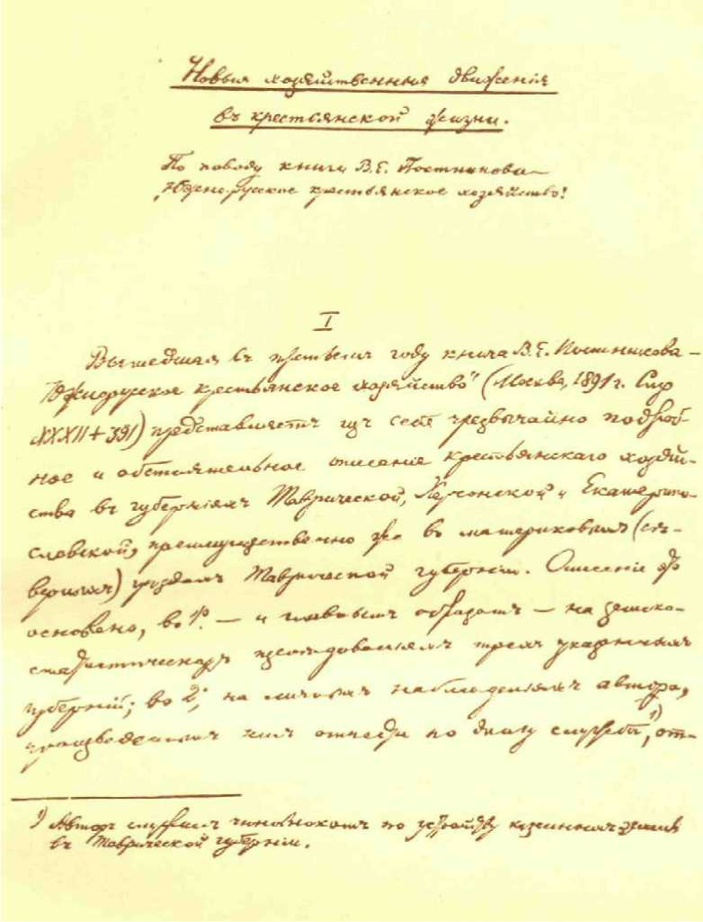 Первая страница рукописи В. И. Ленина «Новые хозяйственные движения в крестьянской жизни»